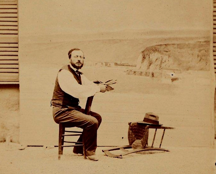 Autoportrait photographique de Gabriel Loppé (1825-1913) - Vente aux enchères Maison Agutte 2014